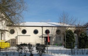 Ehemalige St.-Hildegard-Kirche in Mannheim-Käfertal